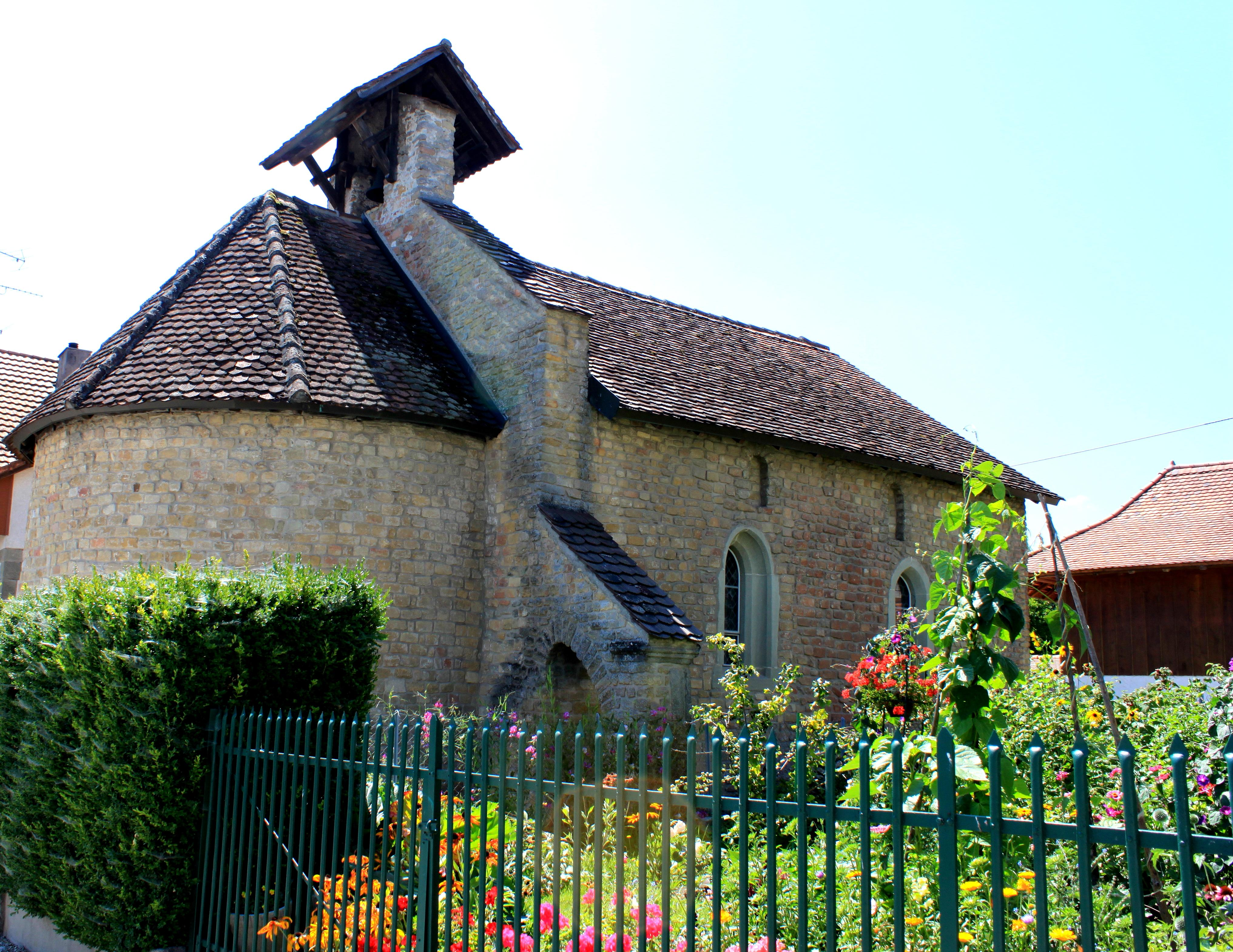 Suisse, canton de Vaud, Avenches, Temple à Donatyre.